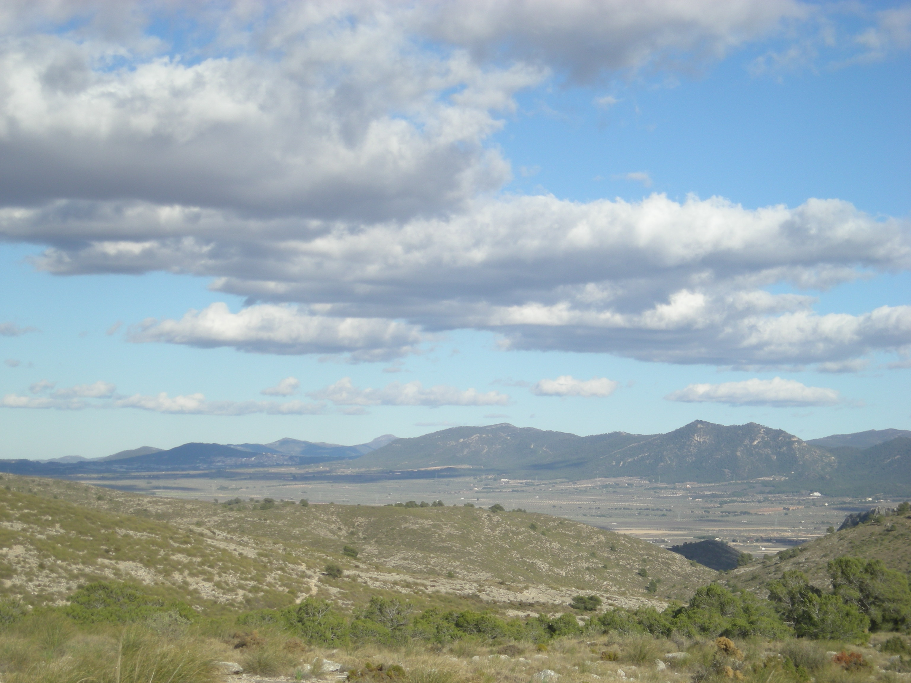 Vista de la Vall de Biar des de la Serra de Sant Cristòfol. Es distingix el barranc del Toconar i darrere la pròpia vall, tancada pels contraforts de la Serra de Mariola. Al fons a l'esquerra queda Banyeres de Mariola i darrere seu es destaquen les formacions muntanyoses de la Vall d'Albaida.